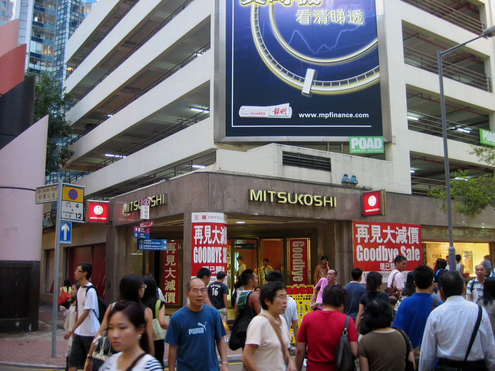 HK Hennessy Centre Mitsukoshi 興利中心三越百貨